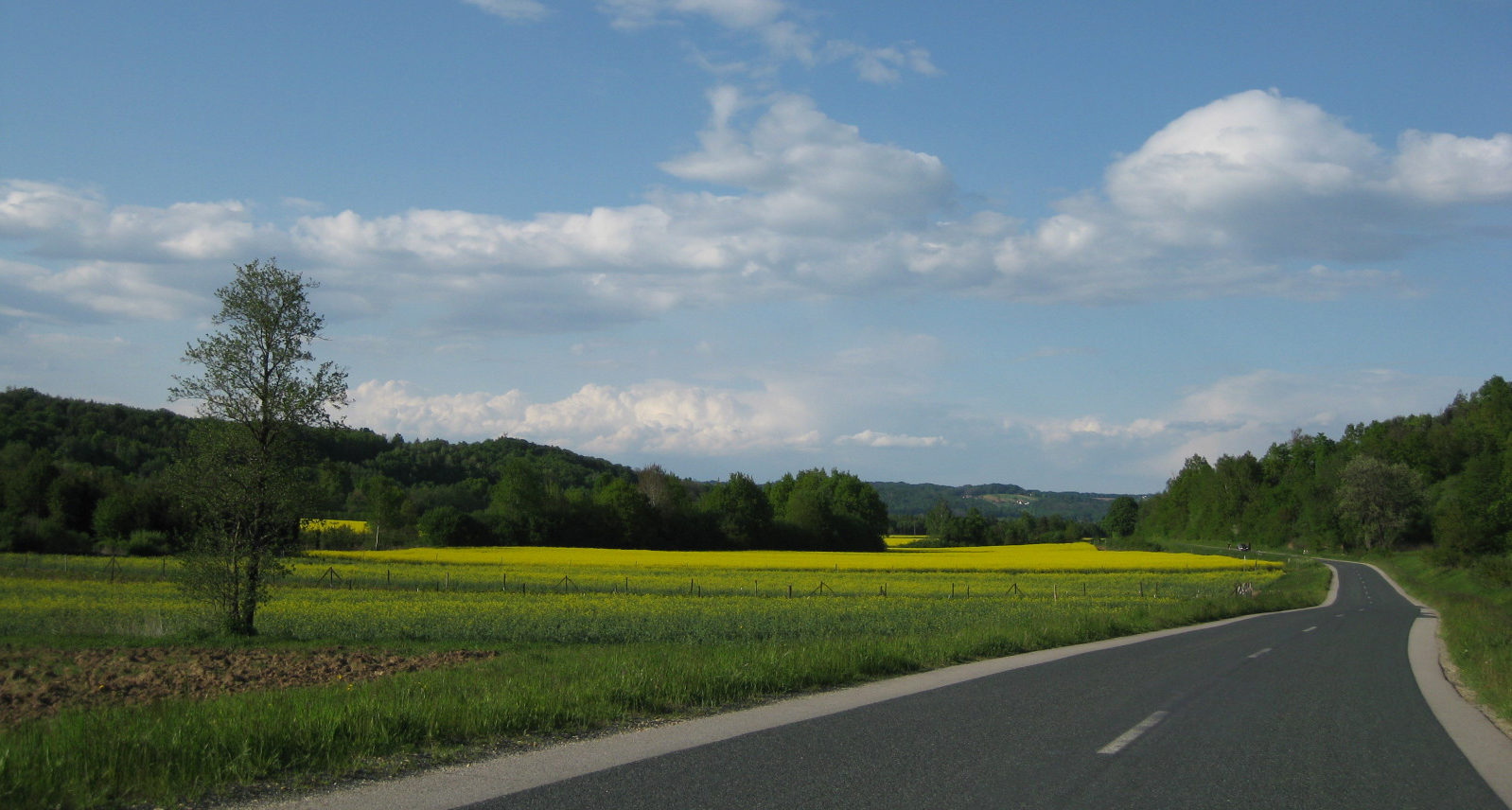 Dolina Seniškega potoka, Porabje, Madžarska